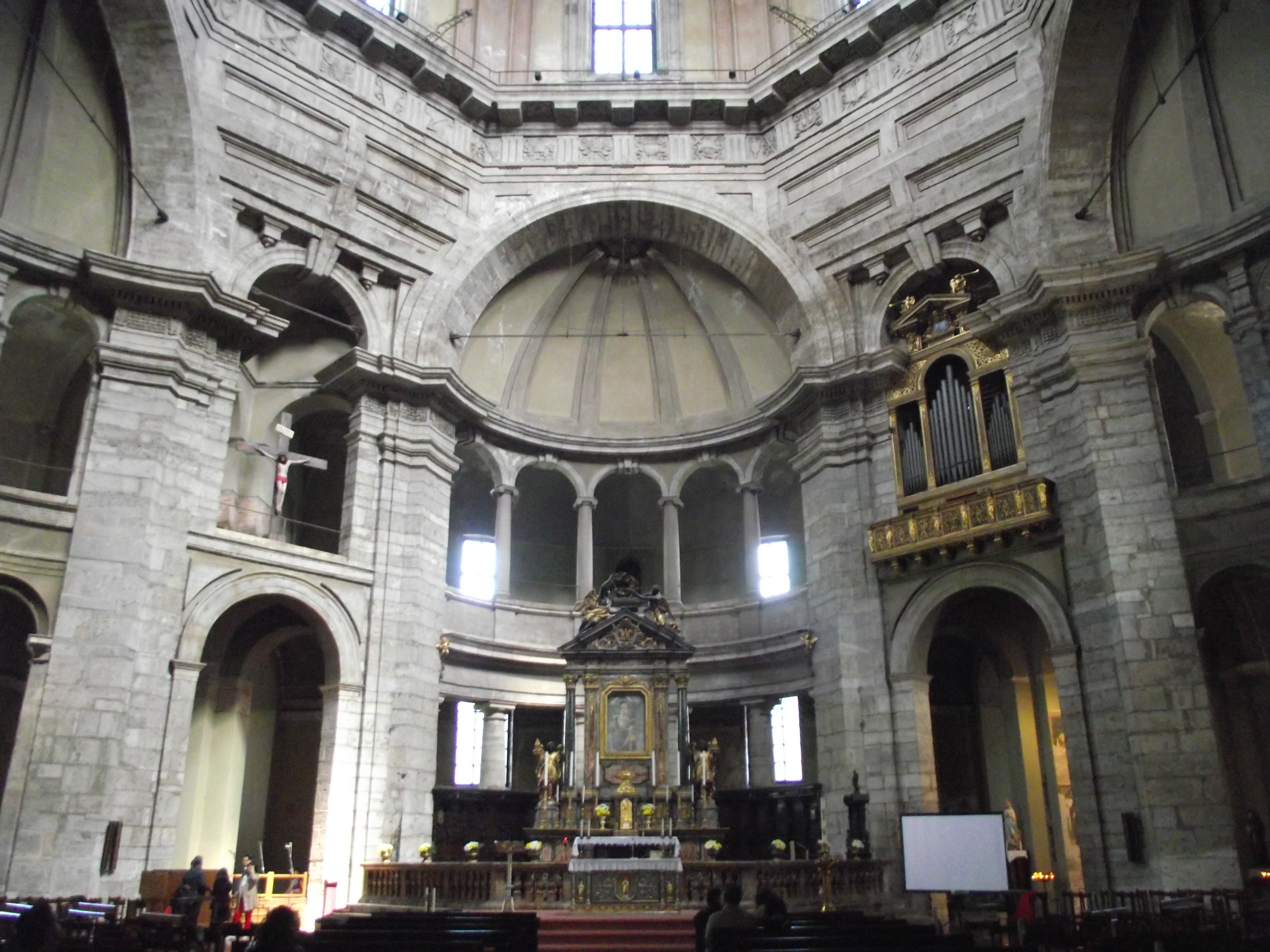 L'interno